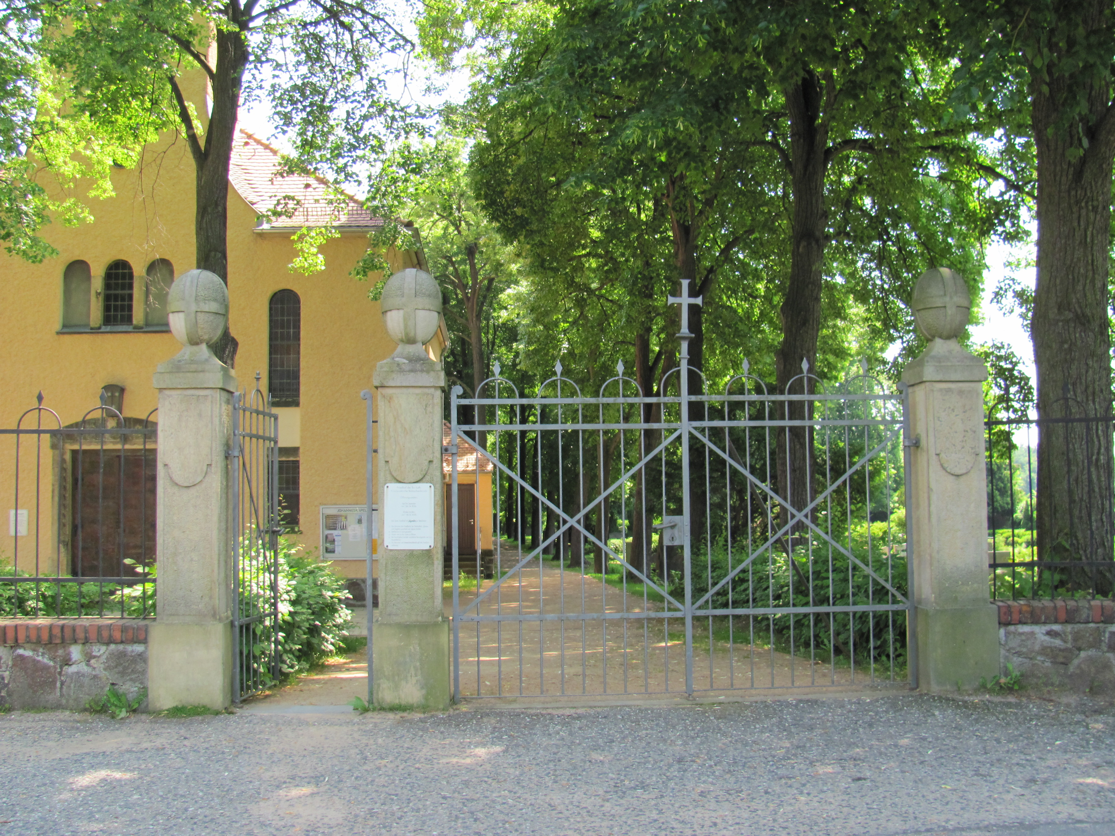 Friedhof Naundorf-Zitzschewig Eingang